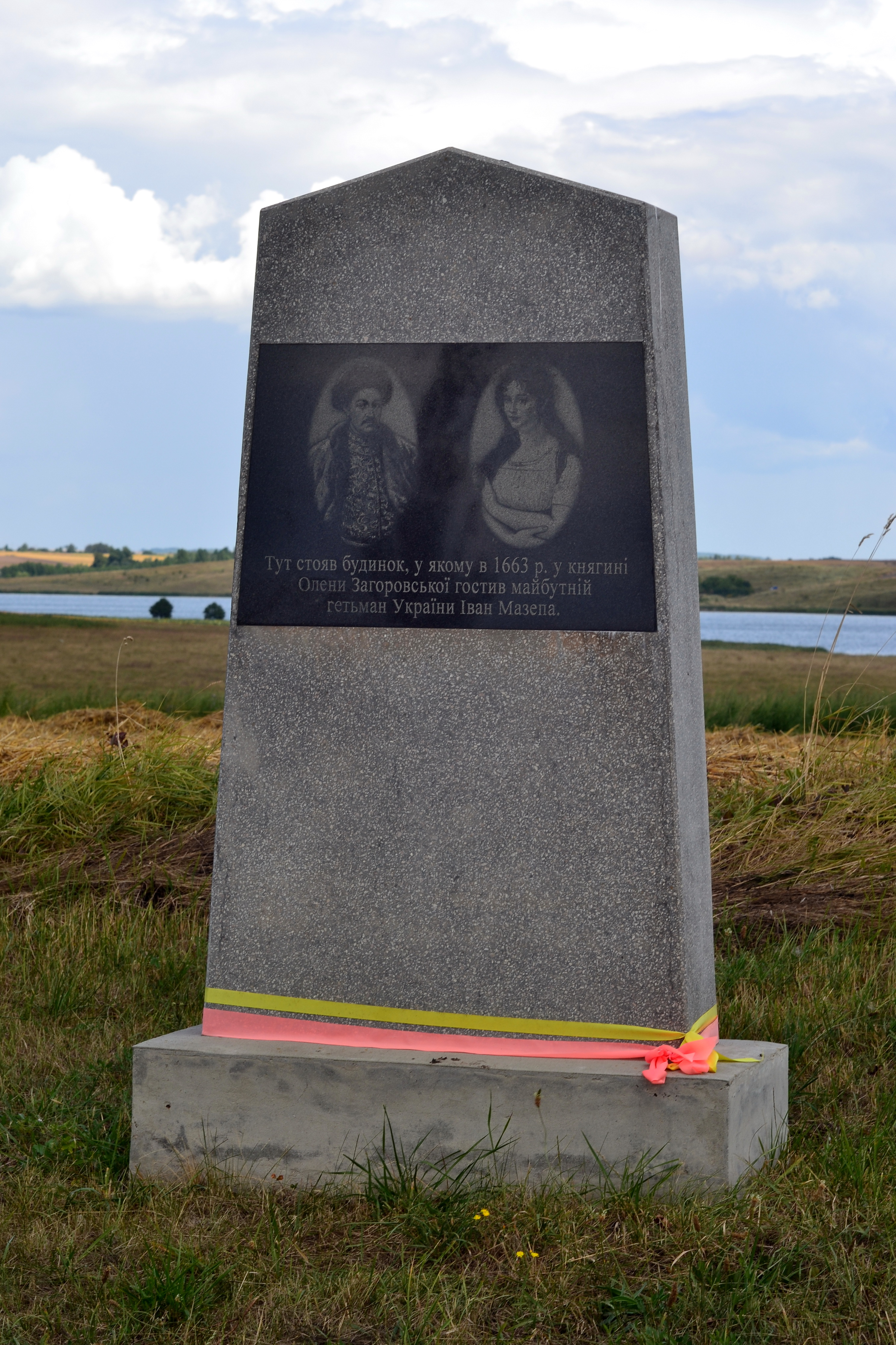 Пам'ятний знак про будинок, у якому в 1663 році у княгині Олени Загоровської гостив майбутній гетьман України Іван Мазепа - Старий Загорів (при в'їзді в село) Локачинський район Волинська область Україна